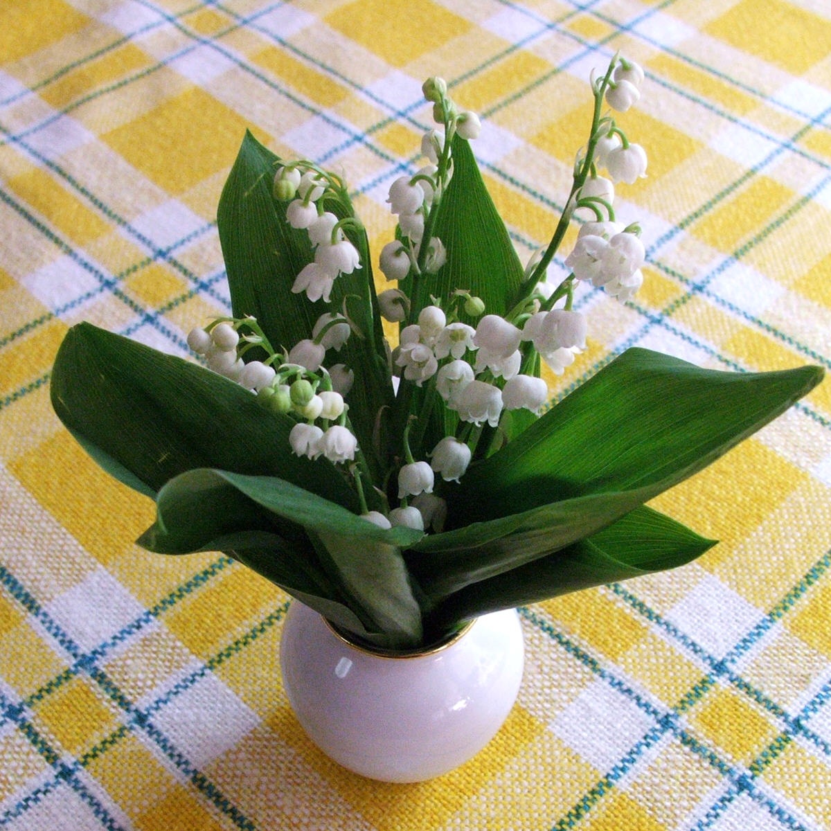 Maiglöckchen (Convallaria majalis)